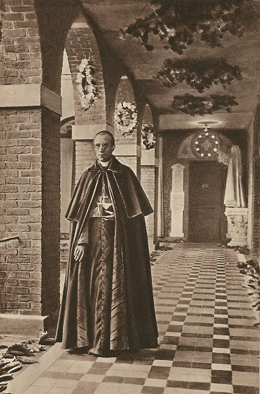 Grabado que muestra al cardenal Pacelli paseando por el claustro de la Basílica de Santa Teresa de Lisieux el 12 de julio de 1937, durante la visita que realizó como legado papal para bendecir el templo.